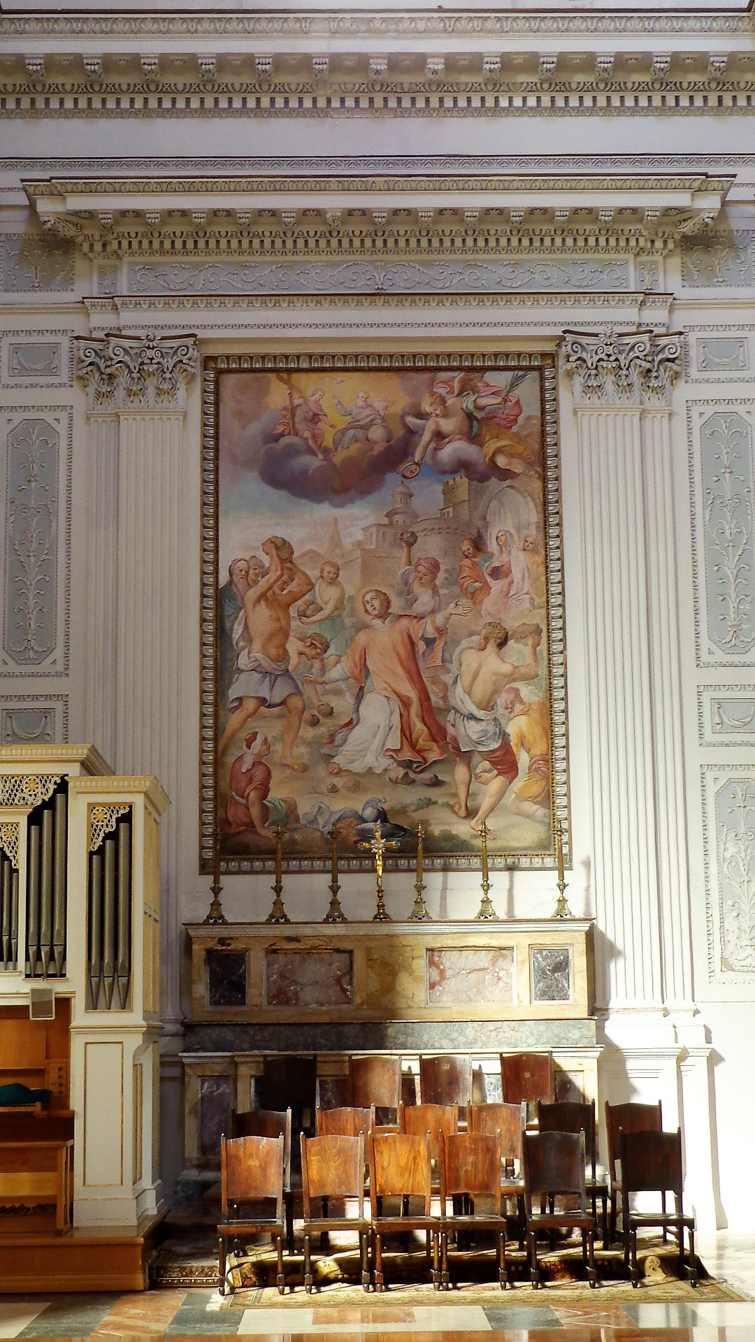 Cappella di Santo Stefano, altare con dipinto raffigurante Lapidazione di Santo Stefano Protomartire, opera di Domenico La Bruna del XVIII secolo, Protobasilica cattedrale di San Lorenzo, Trapani.